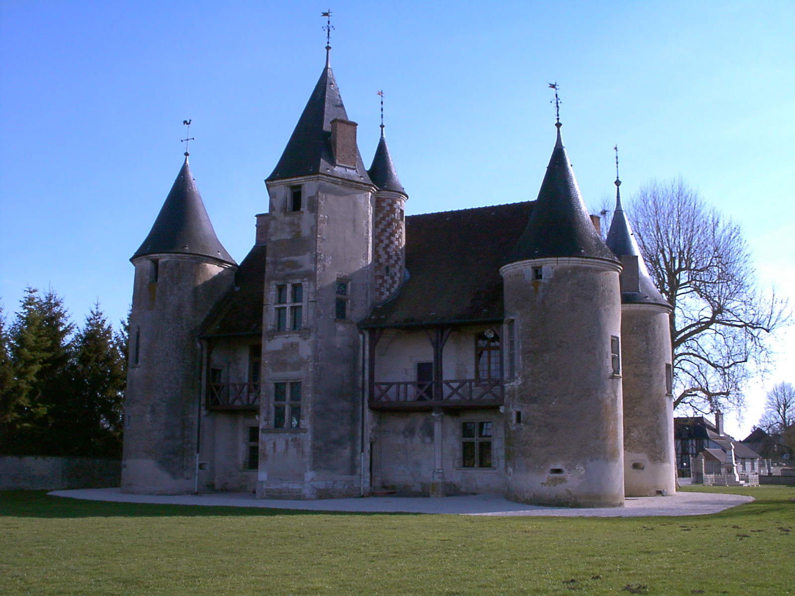 manoir de Rumilly-lès-Vaudes